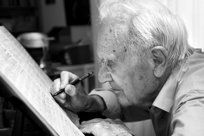 Ludwig Otten aan het werk in zijn studeerkamer. Almen, Gelderland (2012).